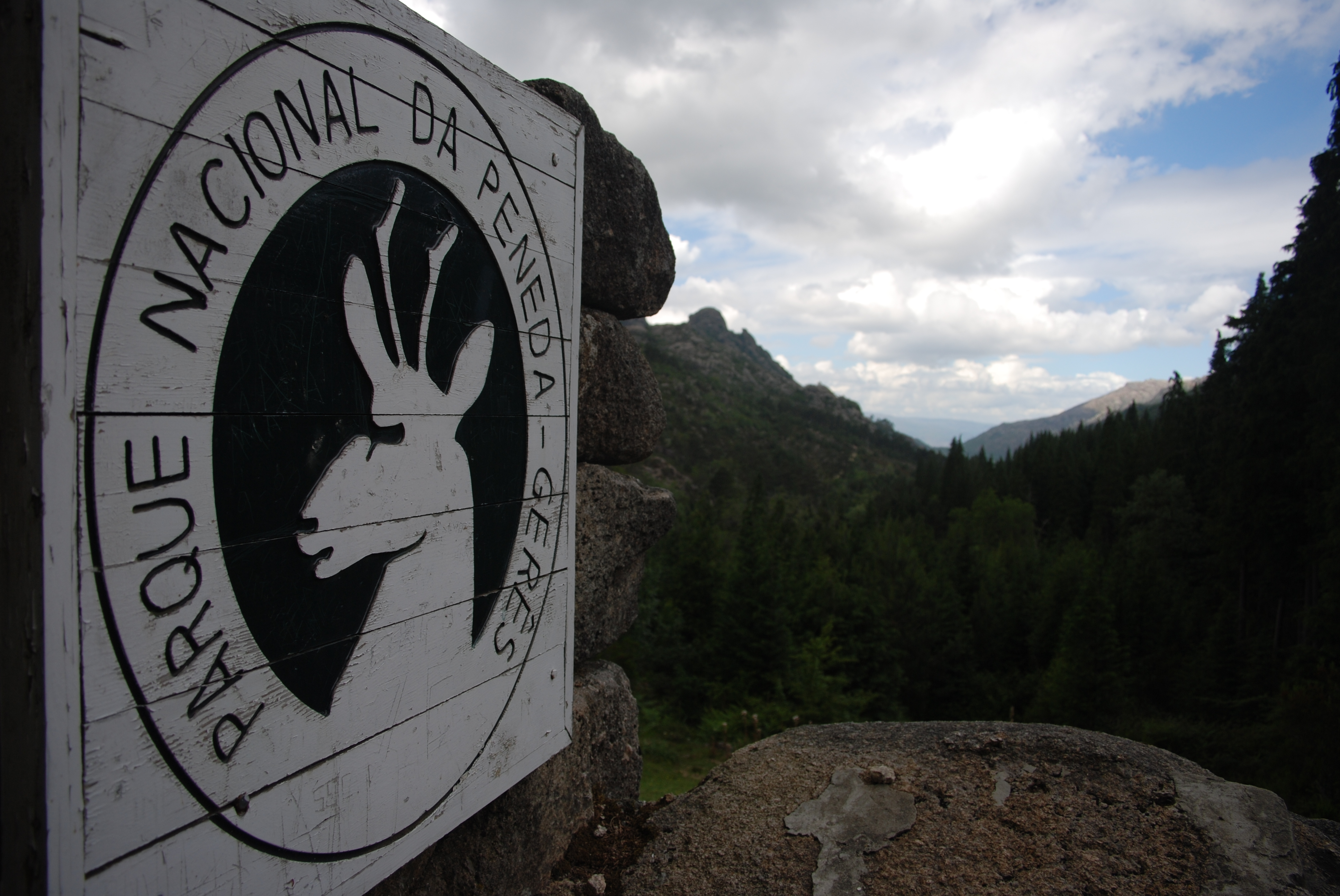 Parque Nacional da Peneda-Gerês Sign near Gerês, Portugal